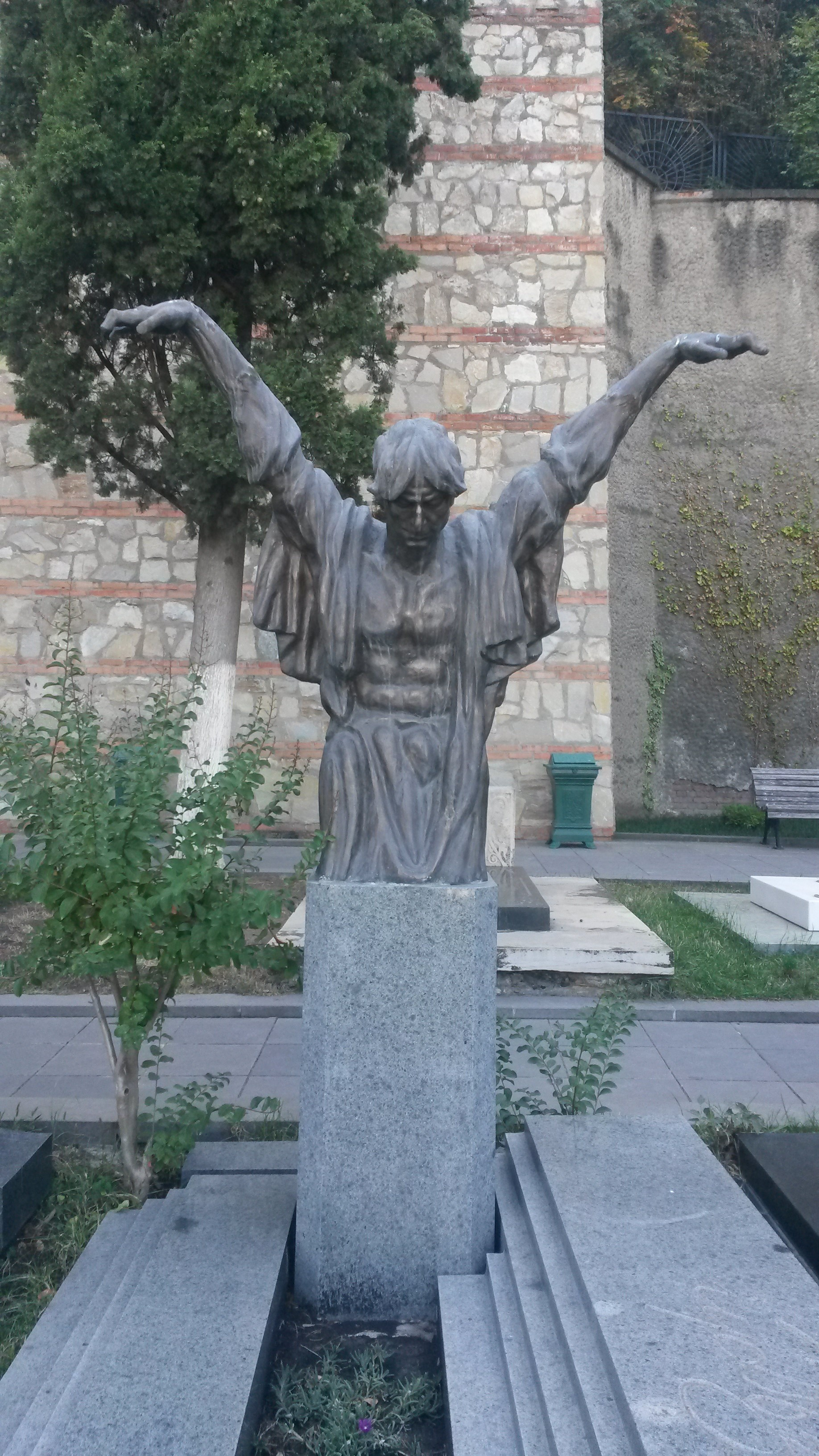 მთაწმინდის პანთეონი